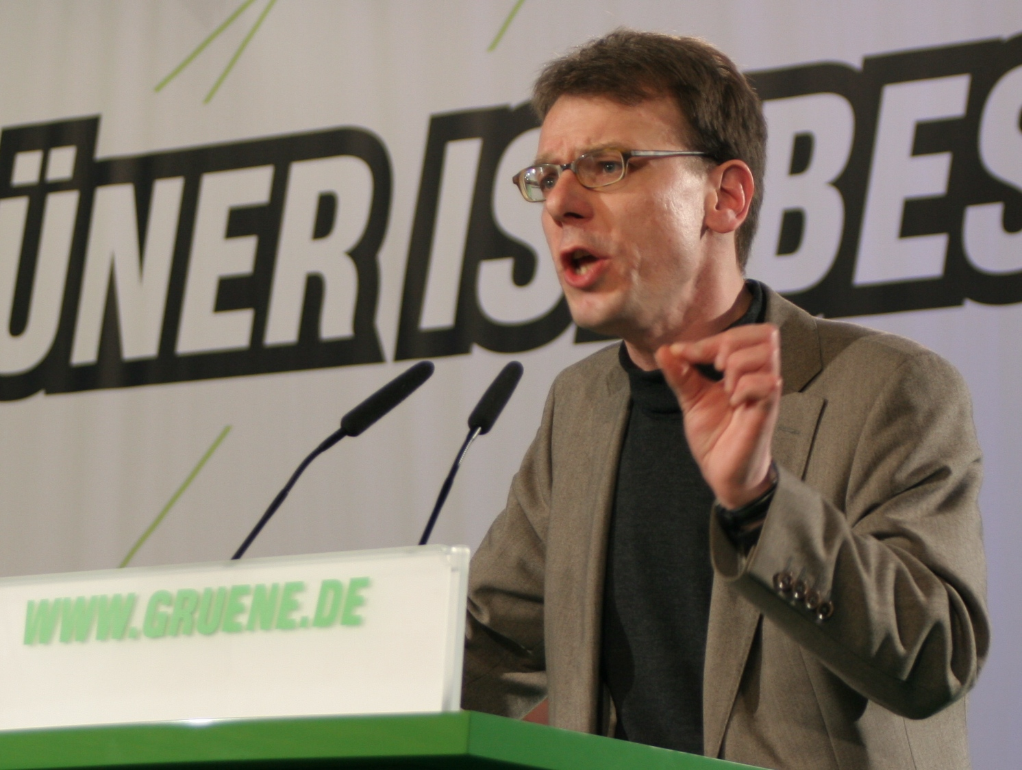 Markus Kurth Anfang Dezember 2006 auf dem Bundesparteitag der Grünen in Köln